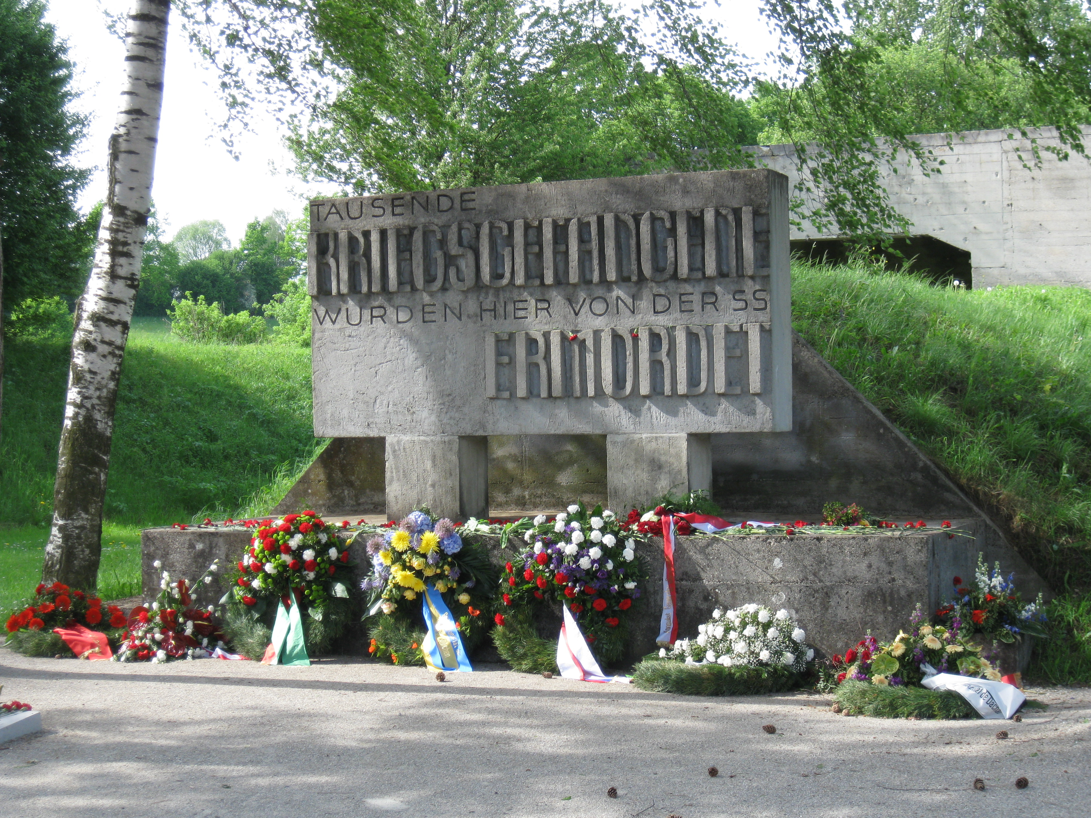 Schießplatz Hebertshausen